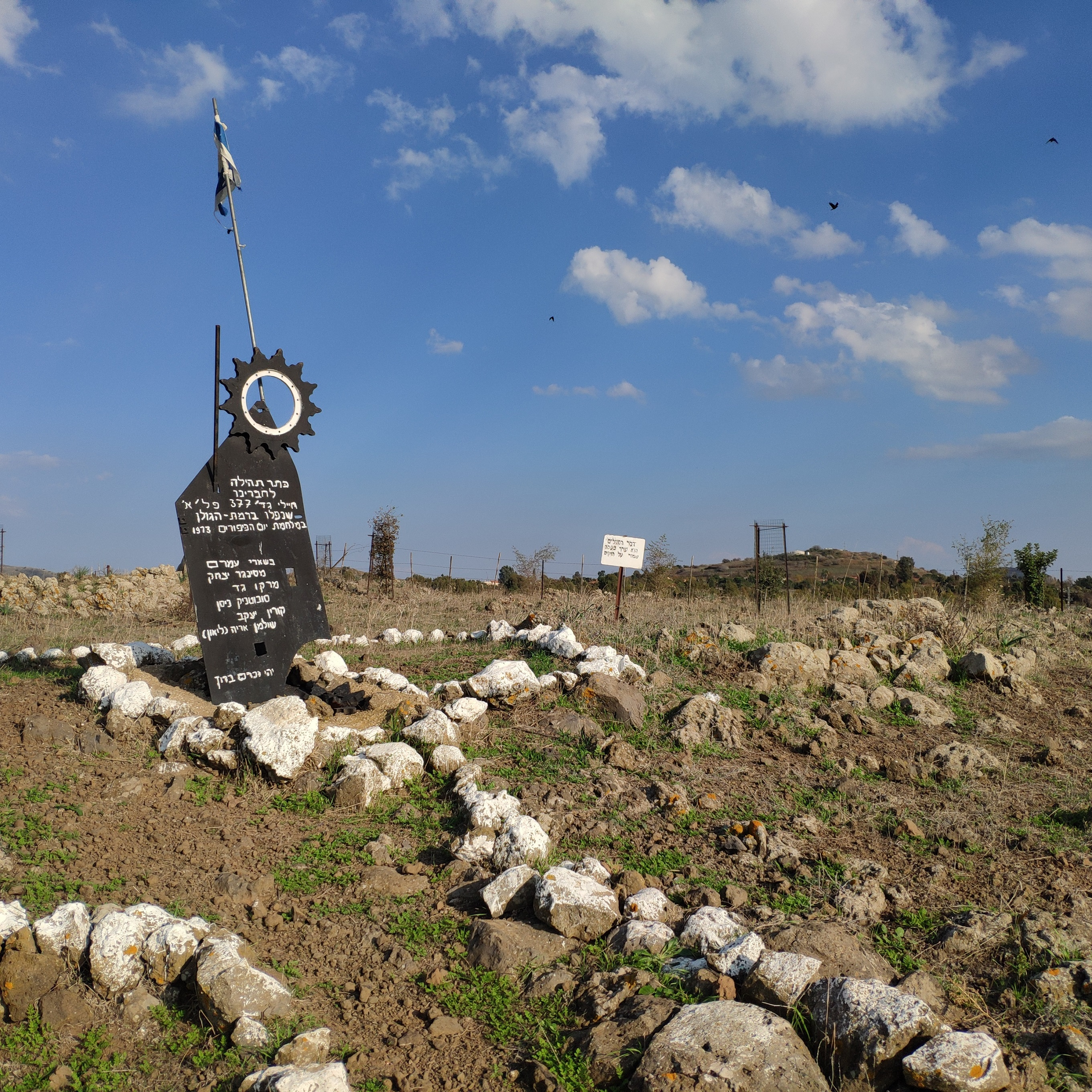 אנדרטה לחללי פלוגה א' מגדוד 377 (חטיבה 9) במלחמת יום הכיפורים. האנדרטה נמצאת על ציר הנפט, ליד מושב קשת.